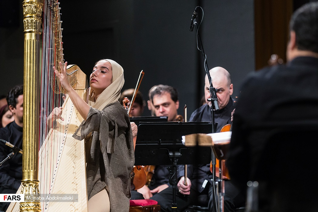 اجرای سولیست نوجوان هارپ «طناز بیگی» (۱۵ ساله) همراه با ارکستر سمفونیک تهران به رهبری شهرداد روحانی ۱۶ شهریور ۱۳۹۷ تالار وحدت تهران